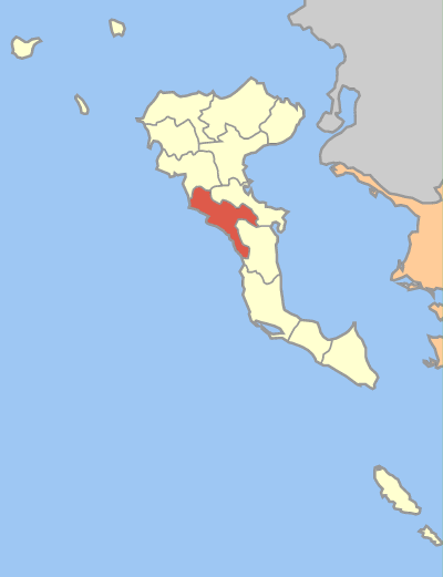 Locator map of Parelii municipality (Δήμος Παρελίων) in Corfu prefecture (Νομός Κέρκυρας) in Greece.